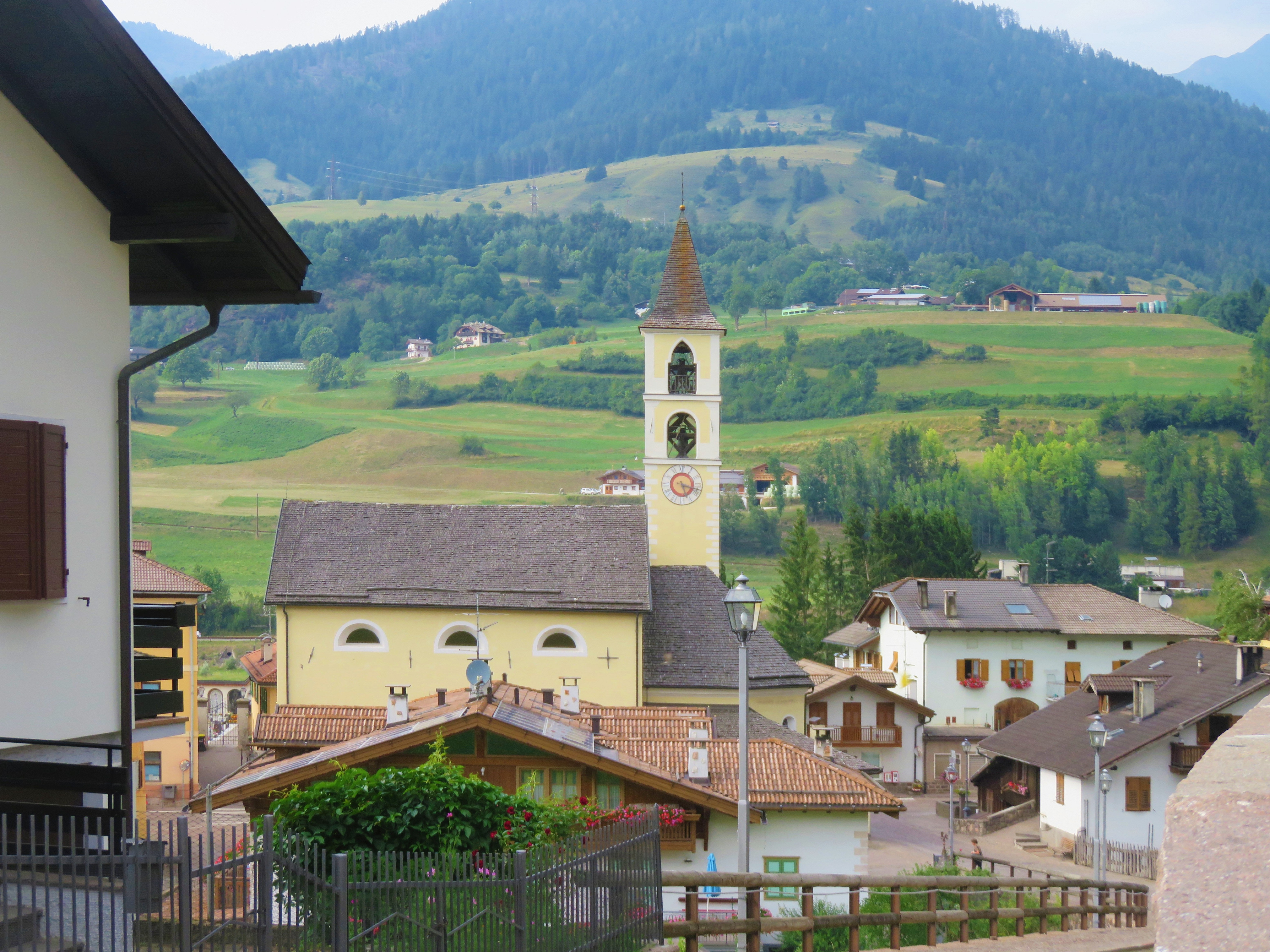 Chiesa della Santissima Trinità (o chiesa della Santissima Trinità e Santa Apollinare) di Masi di Cavalese. Panorama.